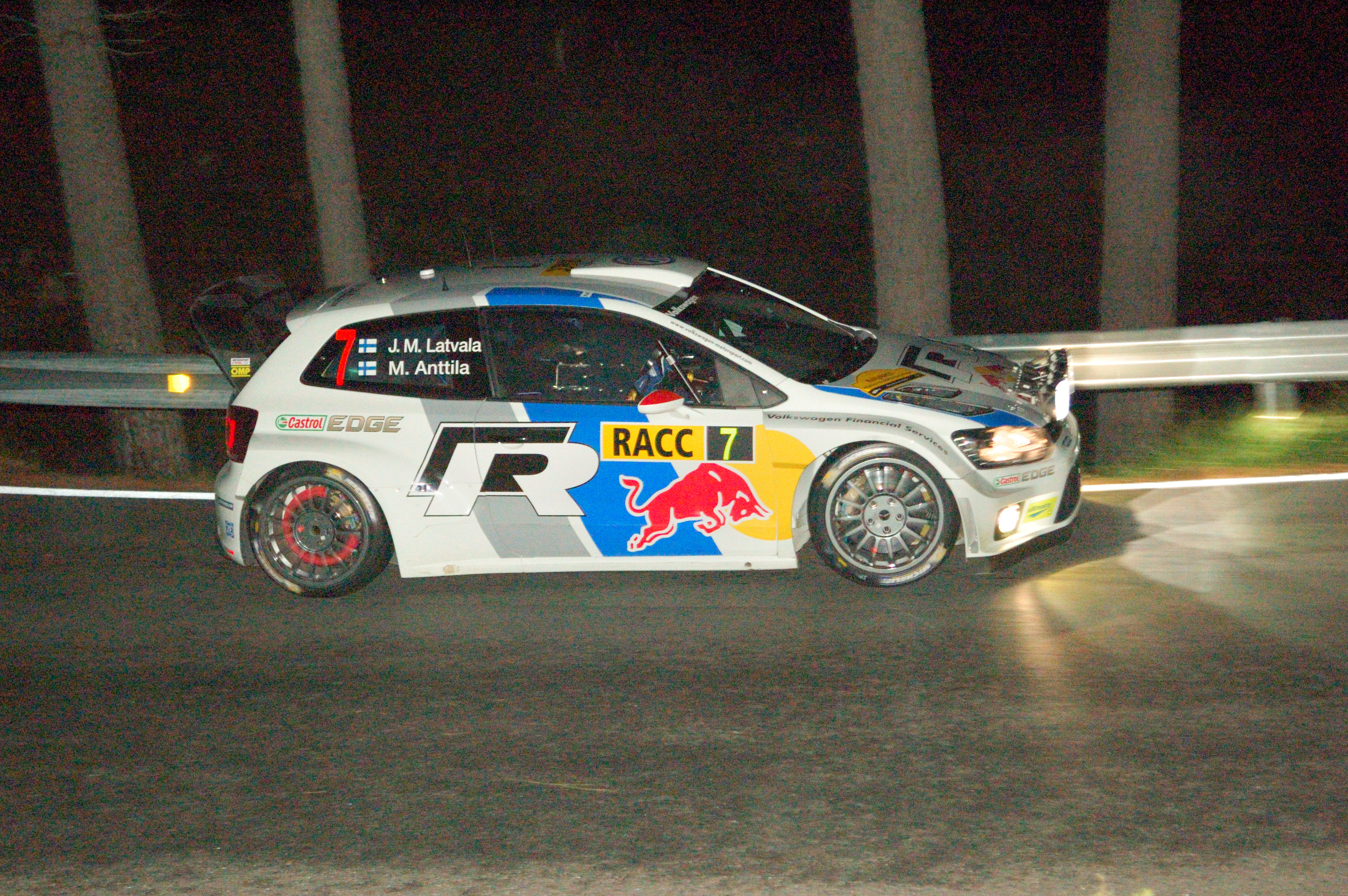 Latvala/Antila SS2 Montmell - Rally Catalunya 2013